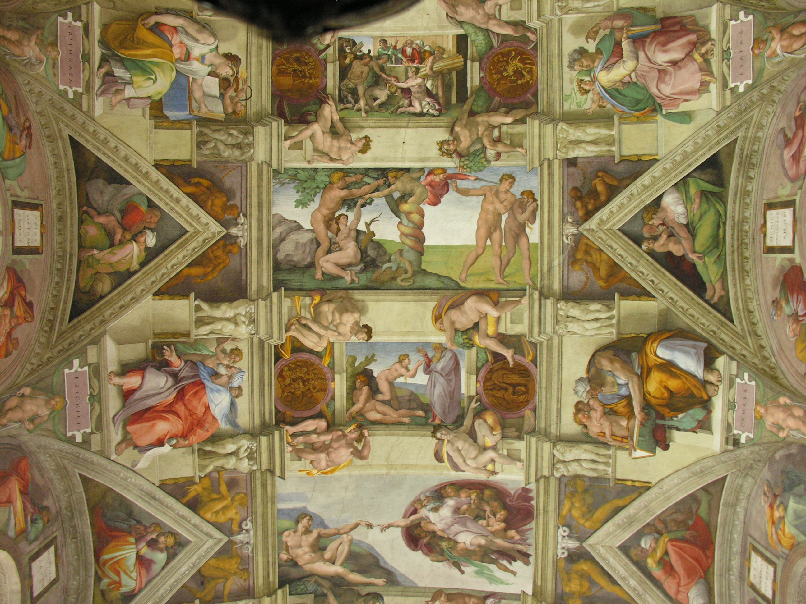 Capilla Sixtina